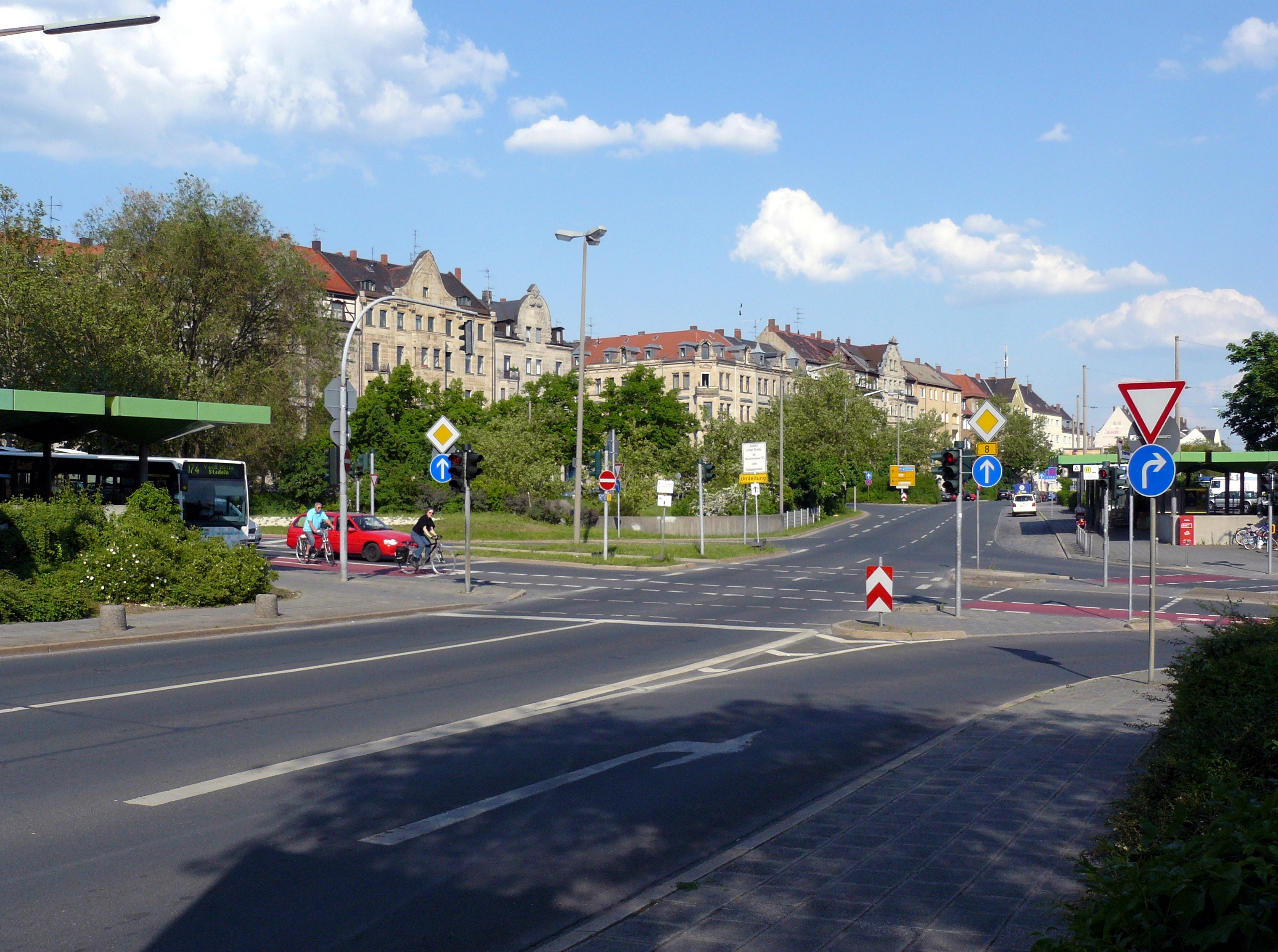 U-Bahnhof Jakobinenstraße, Busbahnhof aus der Gebhardtstraße gesehen